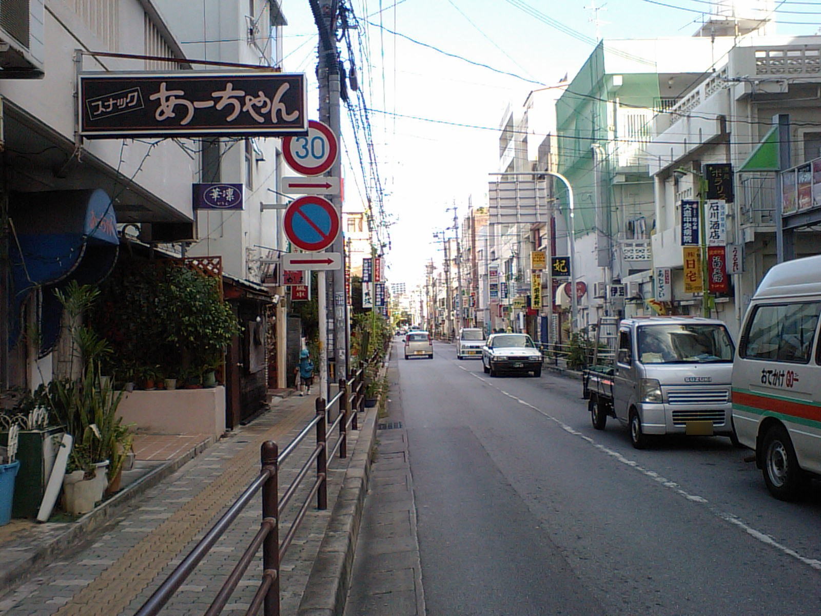 栄町社交街南部方面。安里駅前から栄町通りを東に向けて。平日の夕方である。